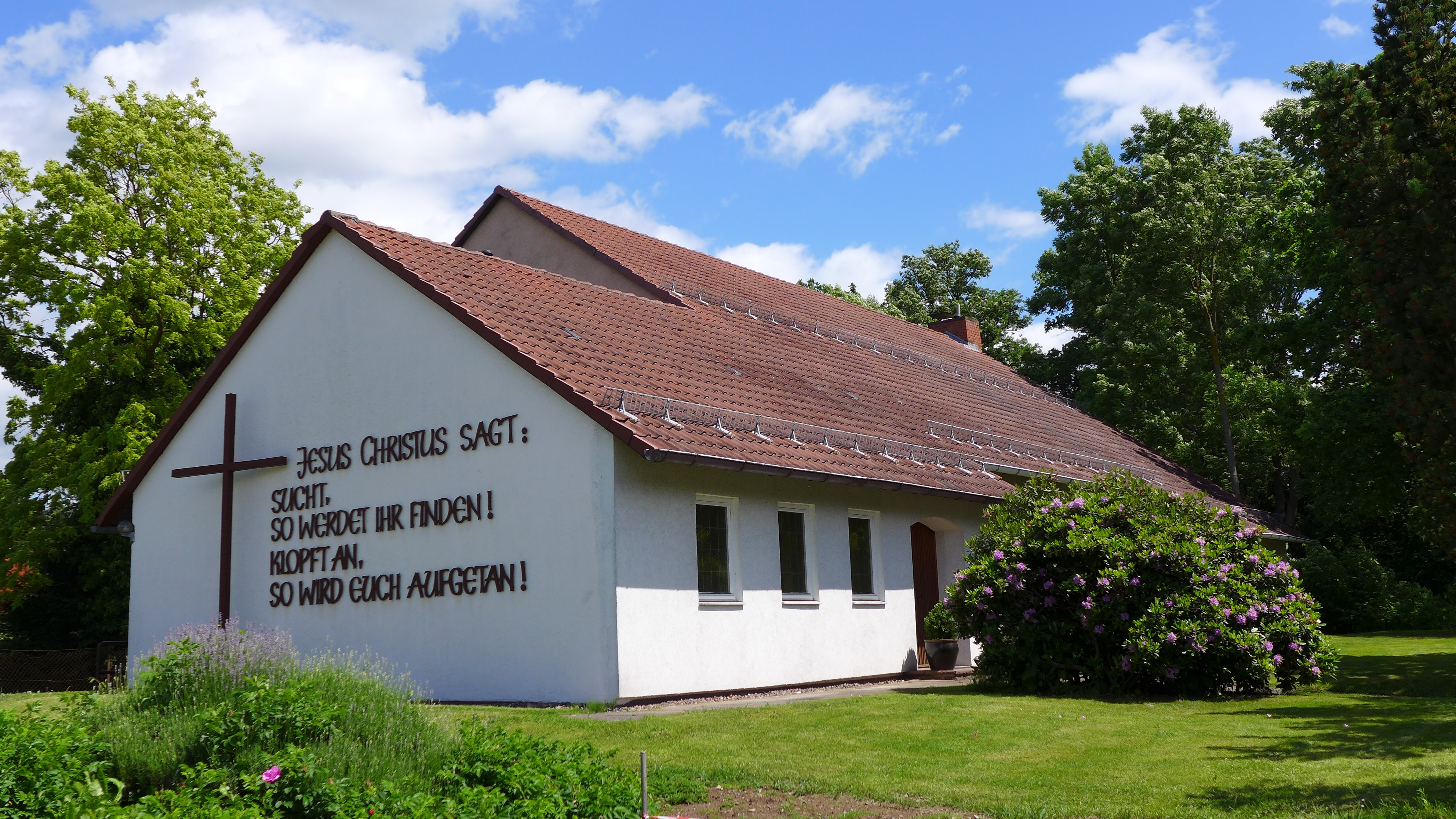 Gemeindehaus (auch Kapelle genannt)